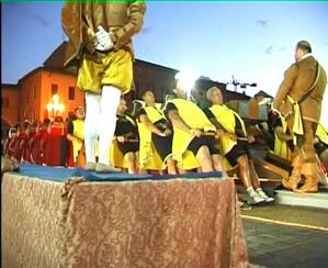 un combattimento nel moderno Gioco del Ponte di Pisa